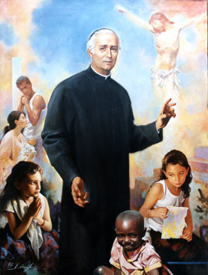 Beato Tommaso Maria Fusco, dipinto di Giuseppe Antonio Lomuscio